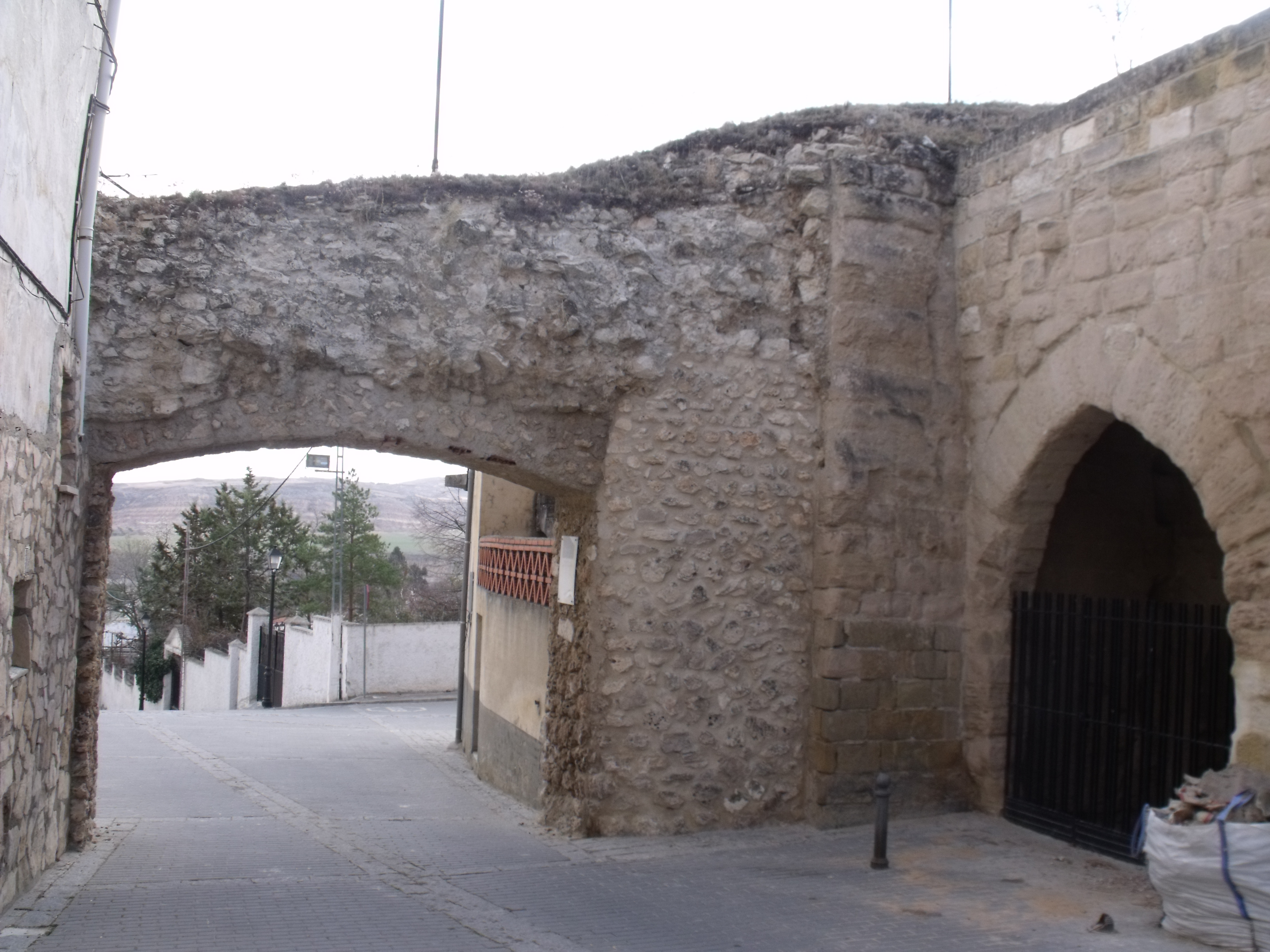 Puerta de Medina, Huete (Cuenca)